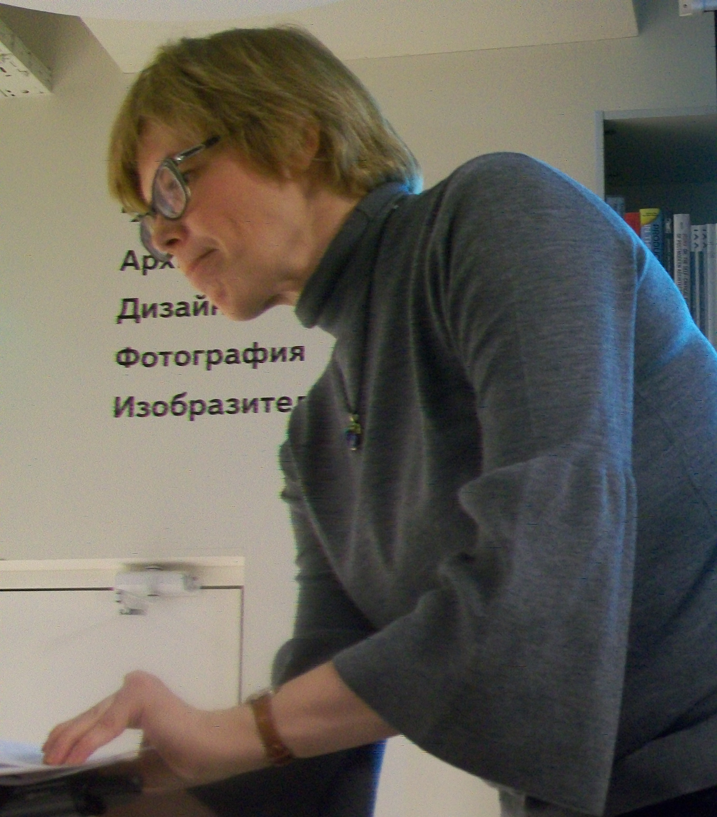 Писательница Майя Кучерская на своем мастер-классе в магазине "Пиотровский" (Ельцин-центр, Екатеринбург). 20 января 2018 года